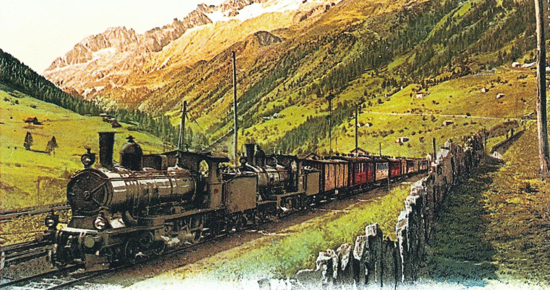 Talwärts fahrender Schnellzug der Gotthardbahn mit zwei Lokomotiven A 3/5 Nr. 201-230 unterhalb von Airolo. Kolorierte Ansichtskarte.